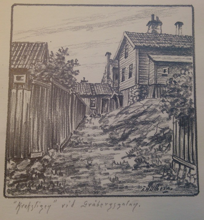 Kolteckning av Einar Hillberg föreställande Krokstigen i Göteborg